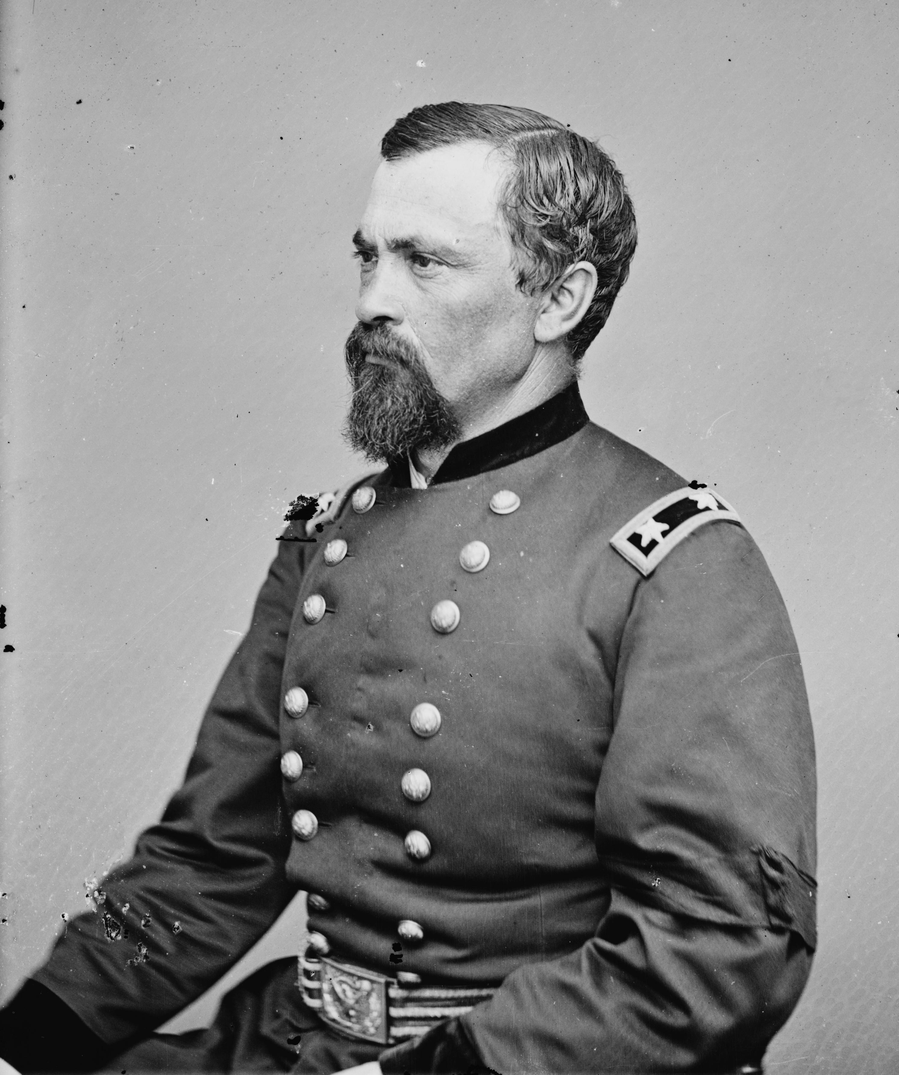 August Kautz. Library of Congress description: "Gen. August Kautz"